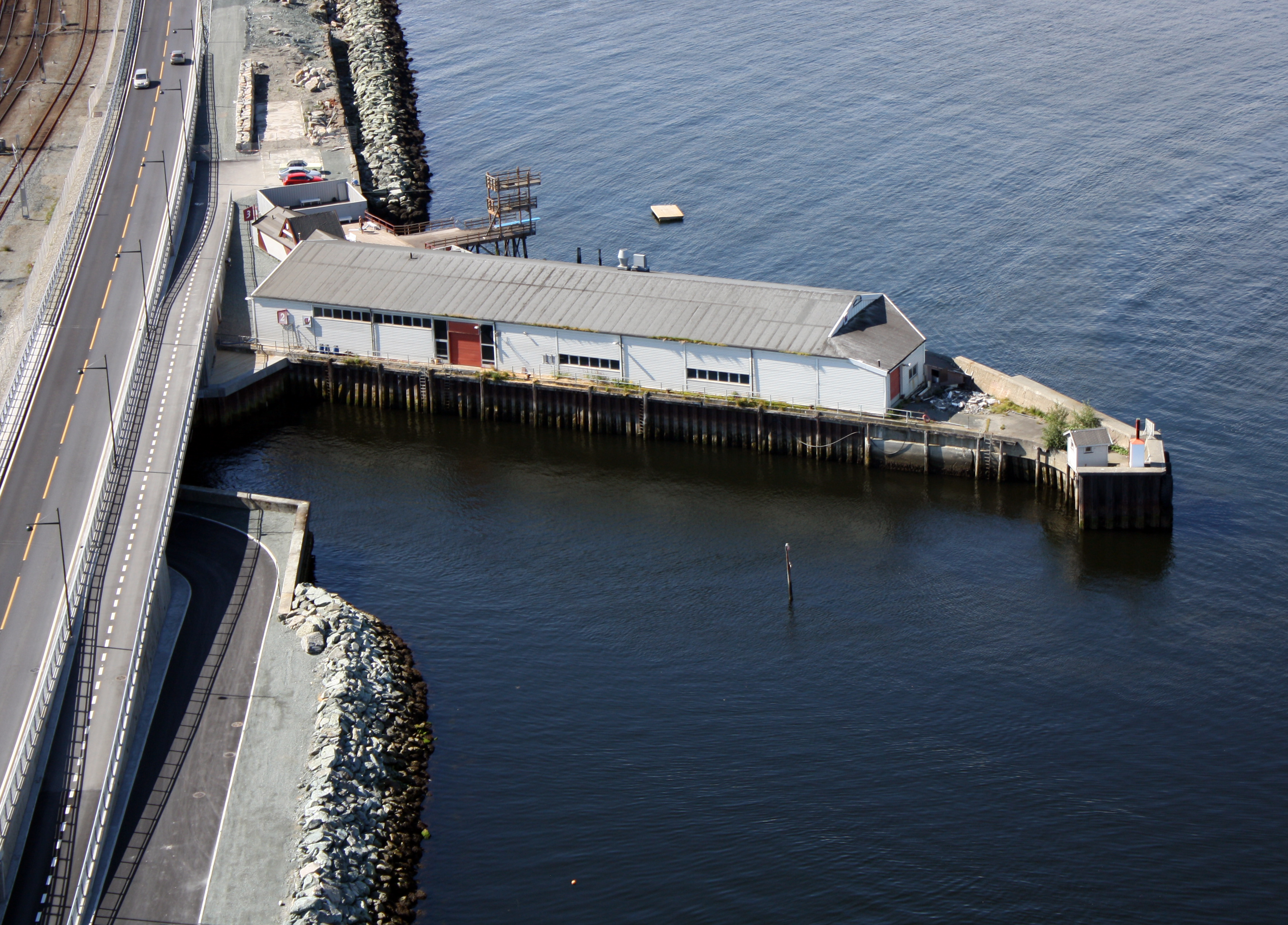 Til venstre Nordre avlastningsveg med Ravnklo bru over Ravnkloløpet. Bak piren skimtes sjøbadet (Søbadeindretningen i Trondhjem).